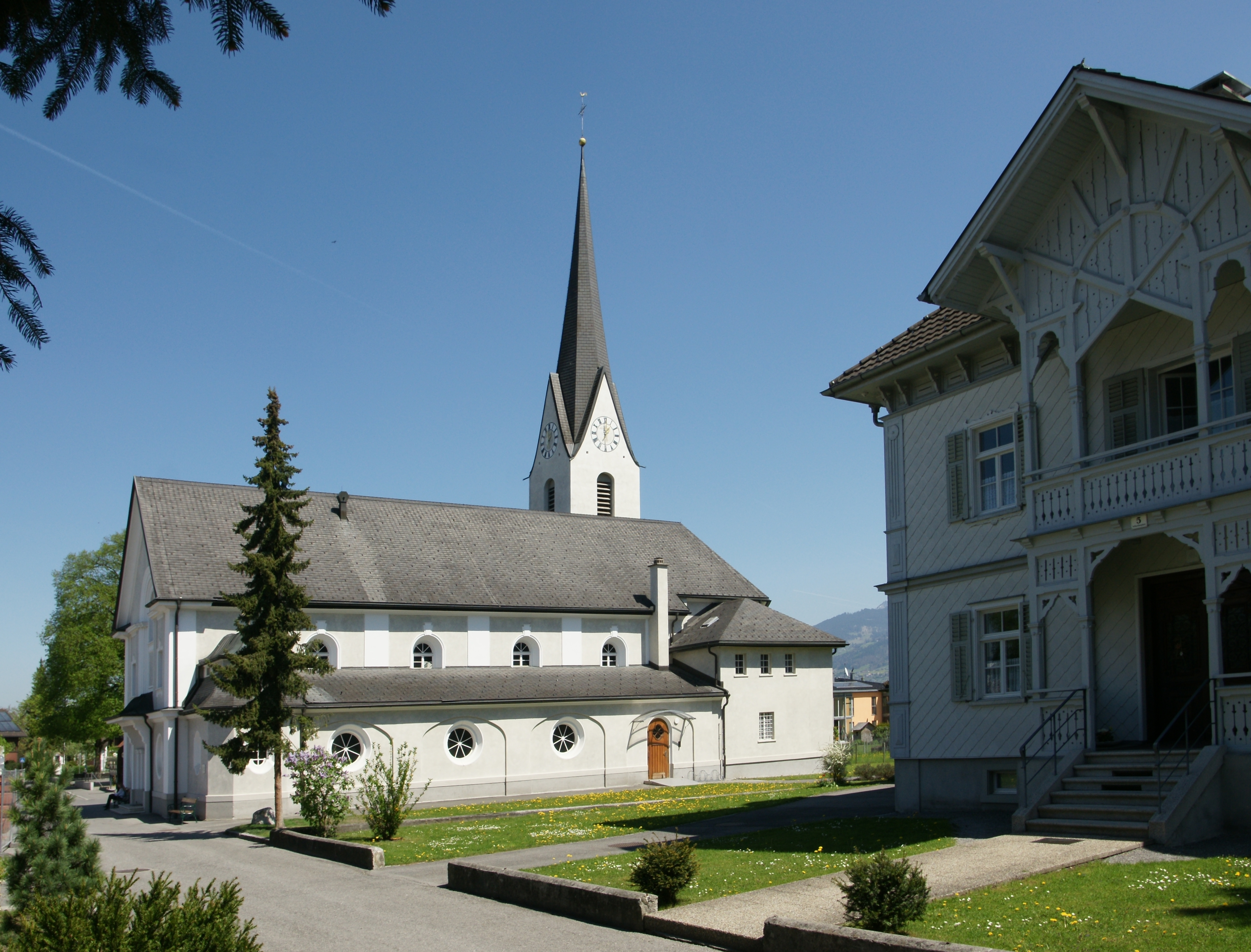 Stadtpfarrkirche "hl. Sebastian" in Gisingen in Feldkirch.1922 erweitert im Lanhaus und Anbau von zwei Seitenschiffe durch Willibald Braun. Rechts im Bild das Pfarrhaus.